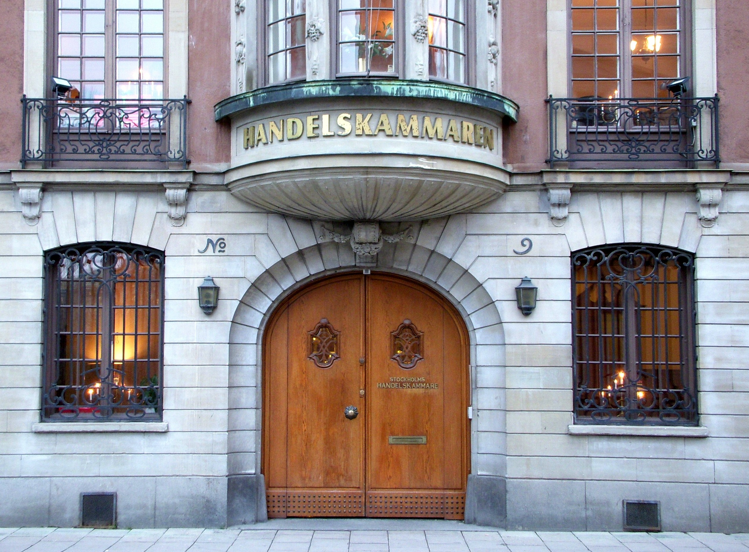 Stockholms Handelskammaren, entré från Västra trädgårdsgatan